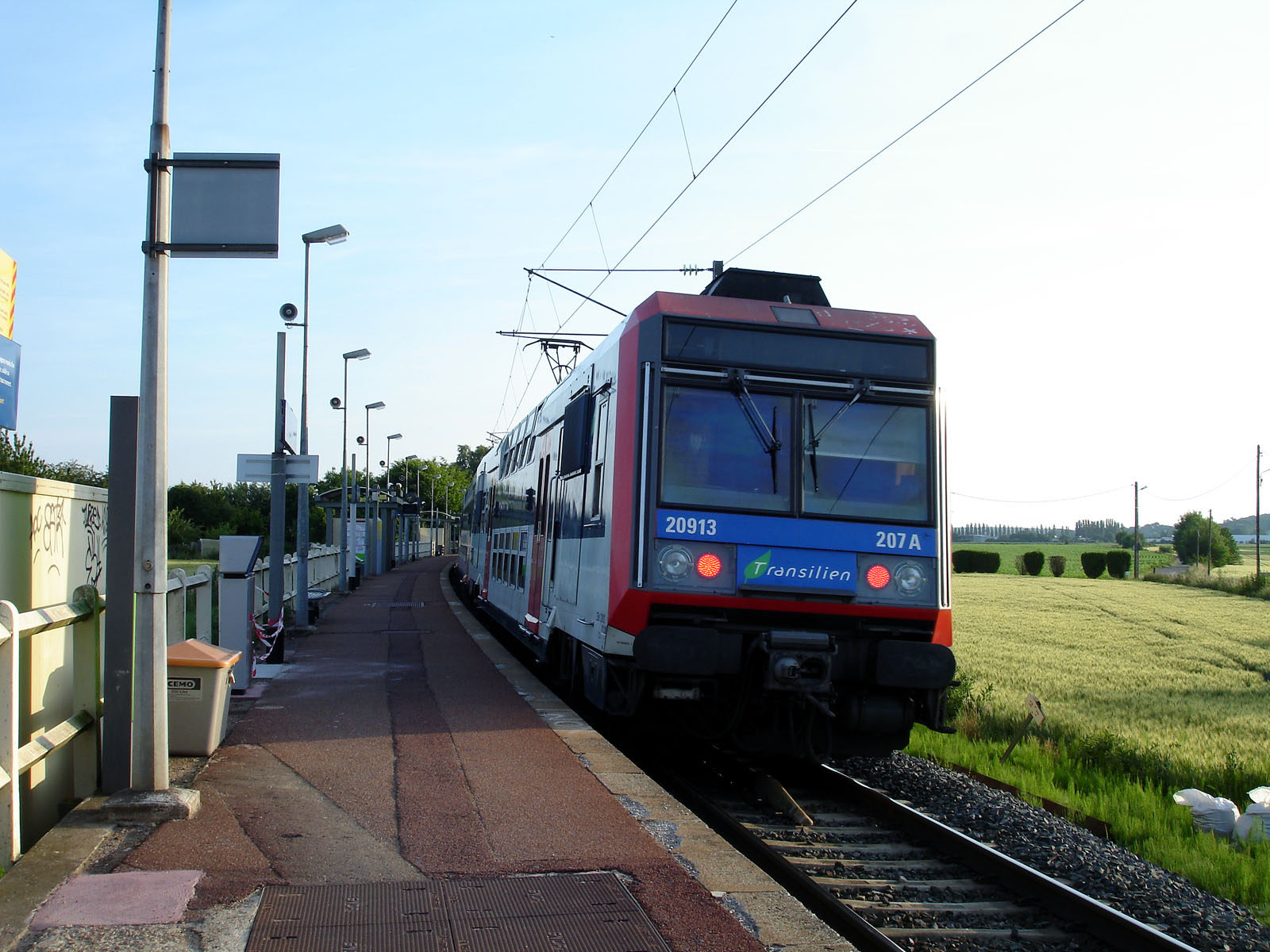 La gare de Villaines, Val-d'Oise, France.